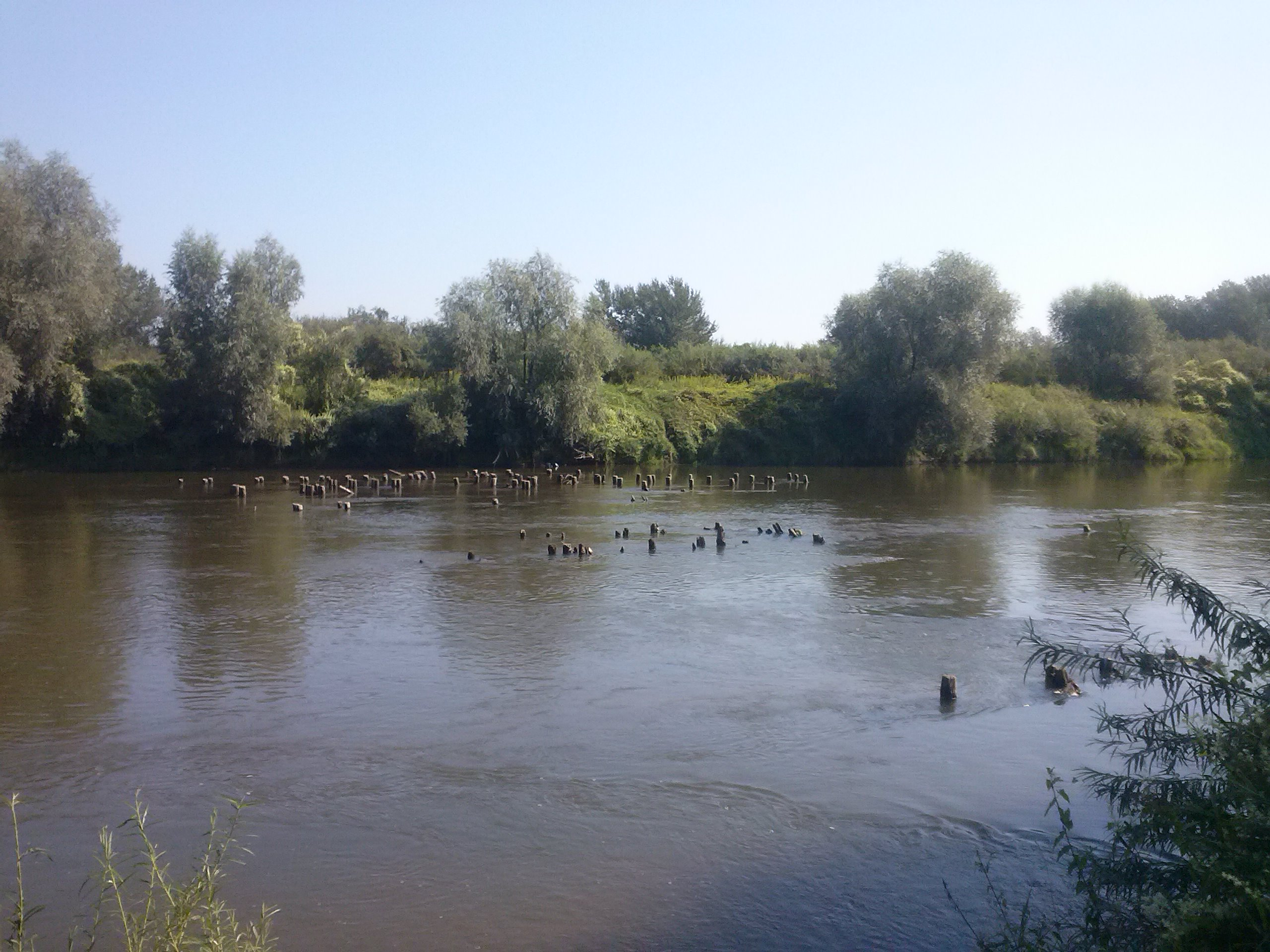 San w miejscu byłego promu w Leżachowie - przy stanie wody 130 cm na wodowskazie "Leżachów", są dokładnie widoczne resztki filarów mostu z 1945 roku